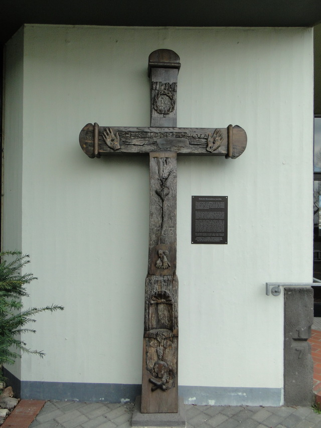 Das alte Missions- und Fußfallkreuz wurde 1763 von der Mutterpfarrei in Küdinghoven über den alten Kirchweg nach Holtorf gebracht und am Backes (Backhaus) des Brandenhofes an der Ecke Löwenburgstraße und Mohnweg aufgestellt. 2006 wurde es an der alten Stelle demontiert und im Juni 2007 an der Burghofstraße 2, der katholischen Kirche St. Antonius Holtorf, aufgestellt.